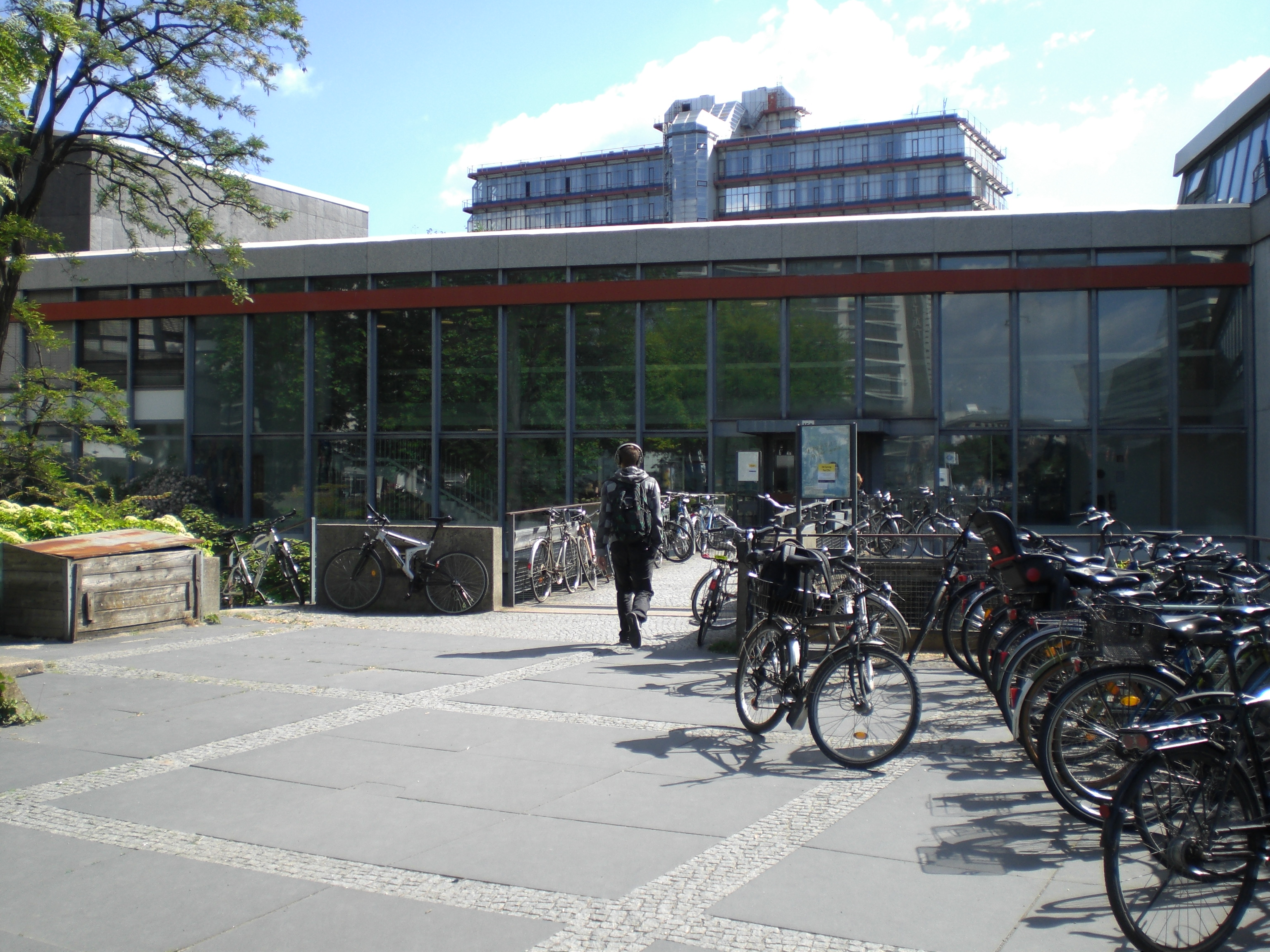 Fassade des Architekturmuseums an der TU Berlin